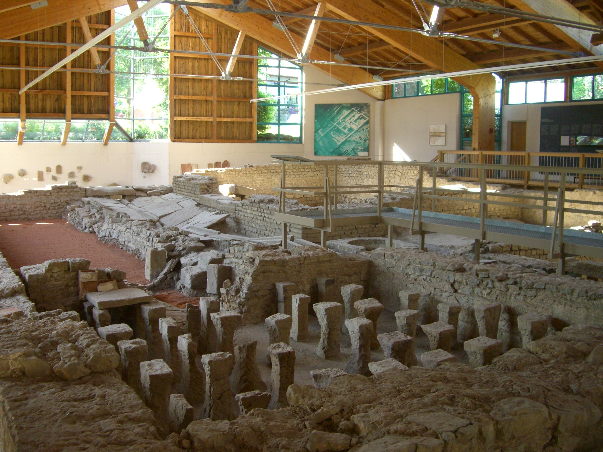 Der hintere Teil des römischen Handelshauses (Gebäude Nr. 19) im Museum Römerhaus Walheim. Im Vordergrund der Wohnraum mit römische Fußbodenheizung.